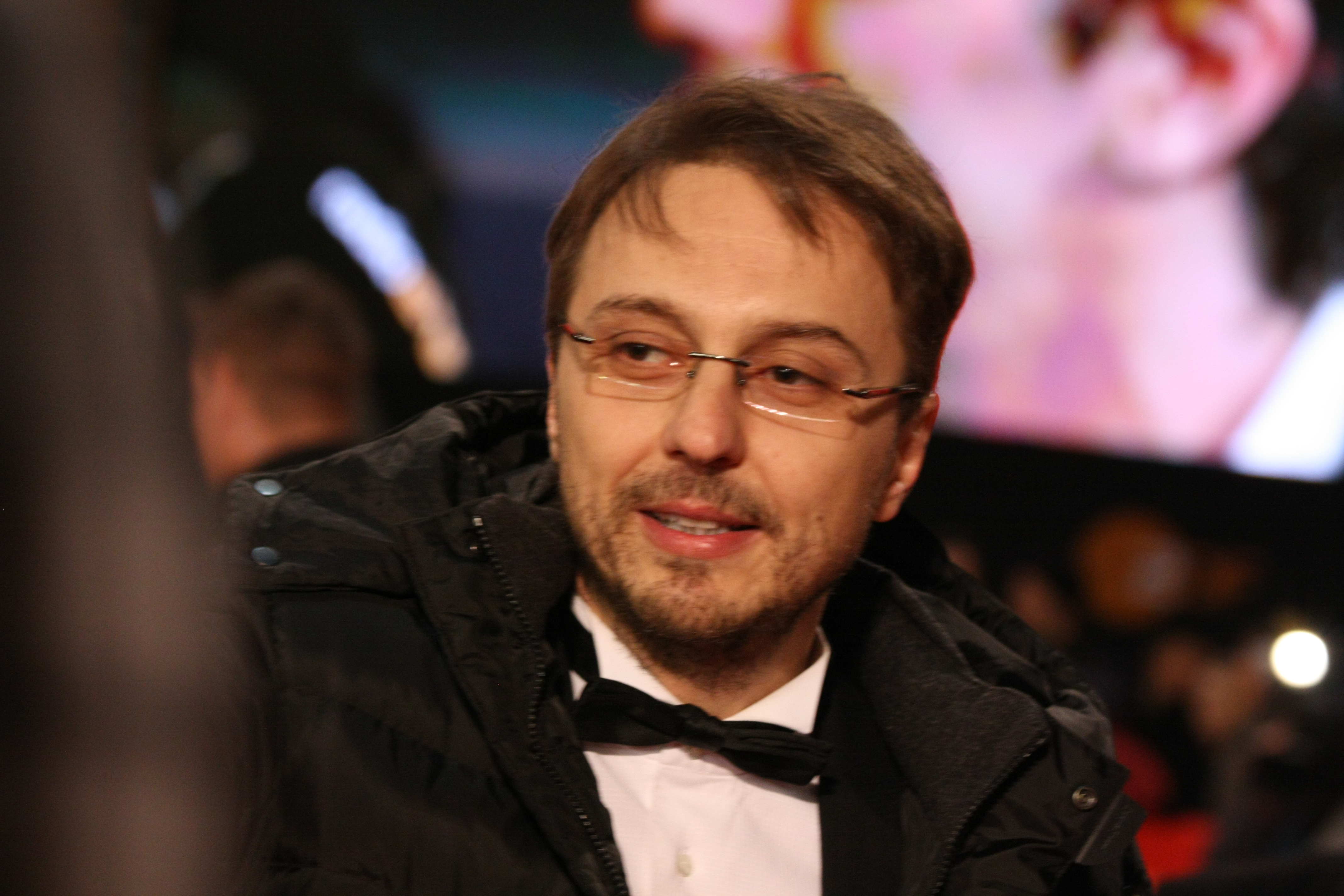 Berlinale 2013 . 63. Internationale Berliner Filmfestspiele - Photo: Alireza Rezvani Pictures . Web . Multimedia